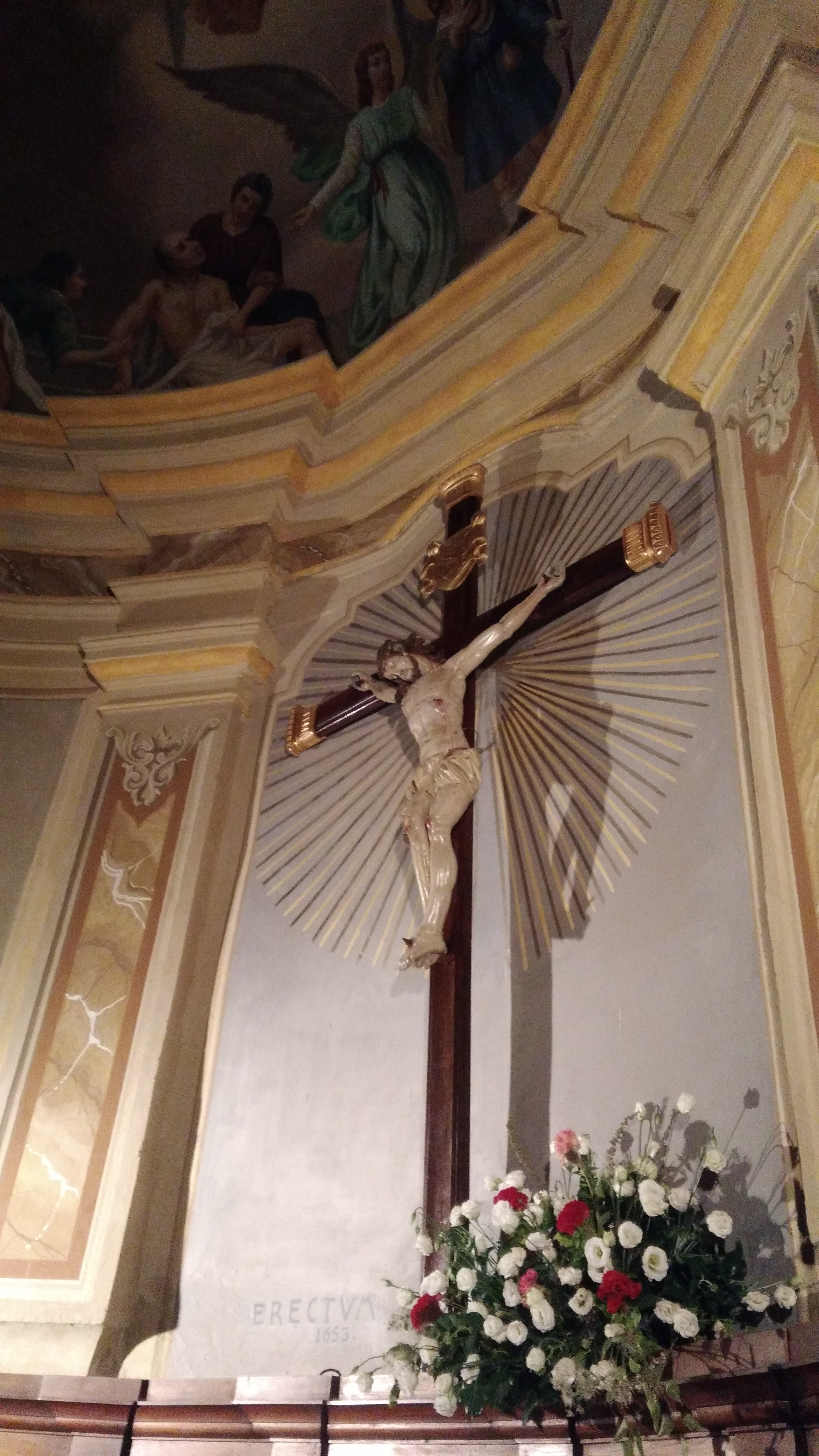 Crocifisso della chiesa parrocchiale di Acero